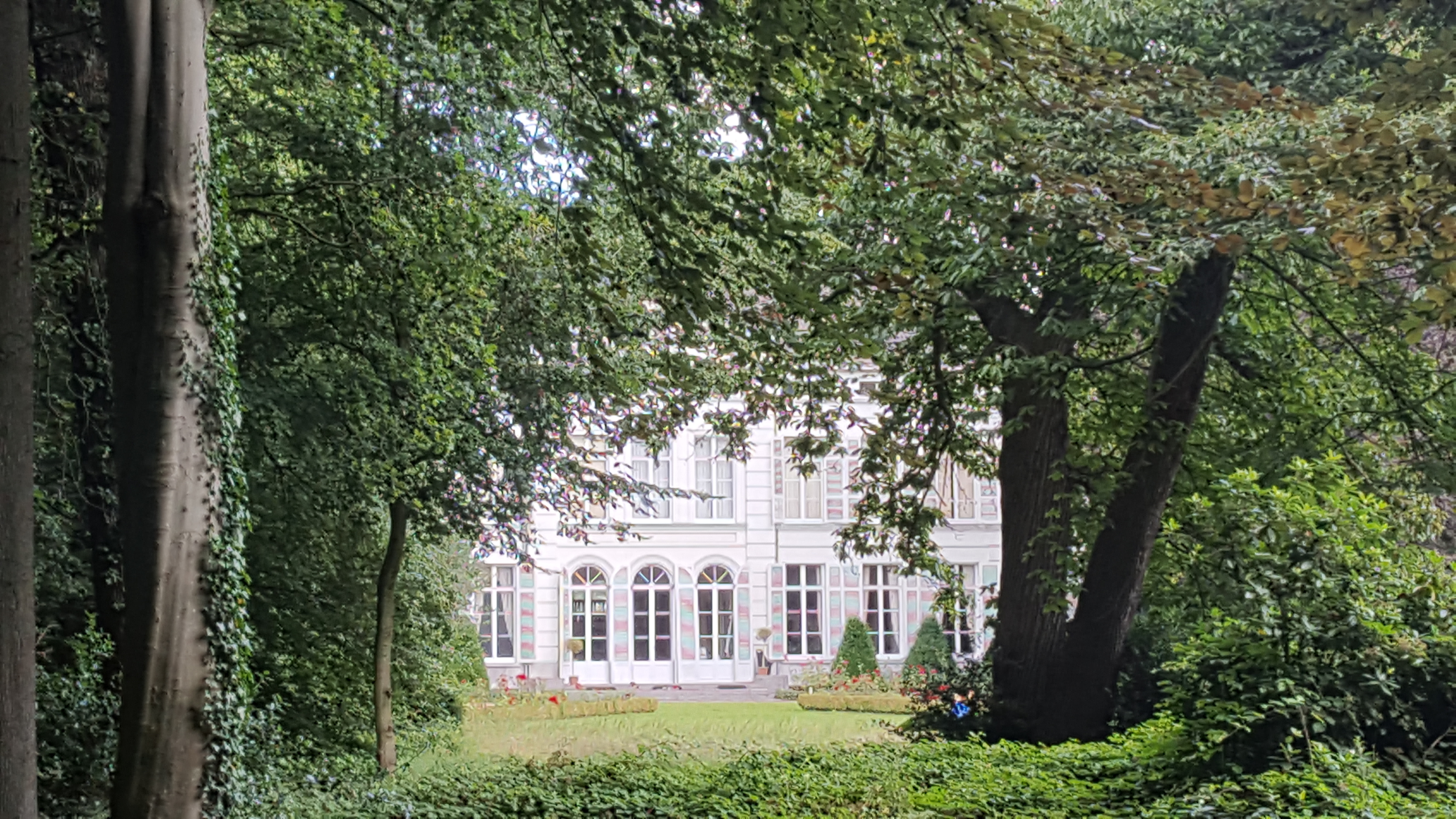 Kasteeldomein Aveschoot, Lembeke, België